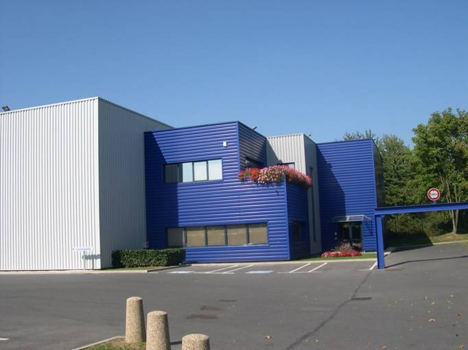 Une entreprise de la zone industrielle de Torcy